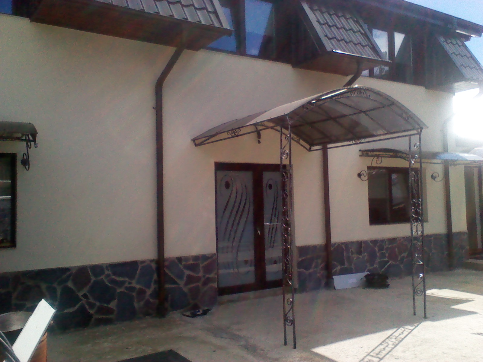 Aceasta este o poză a locului în care a fost Școala Domnească din Fălticeni.